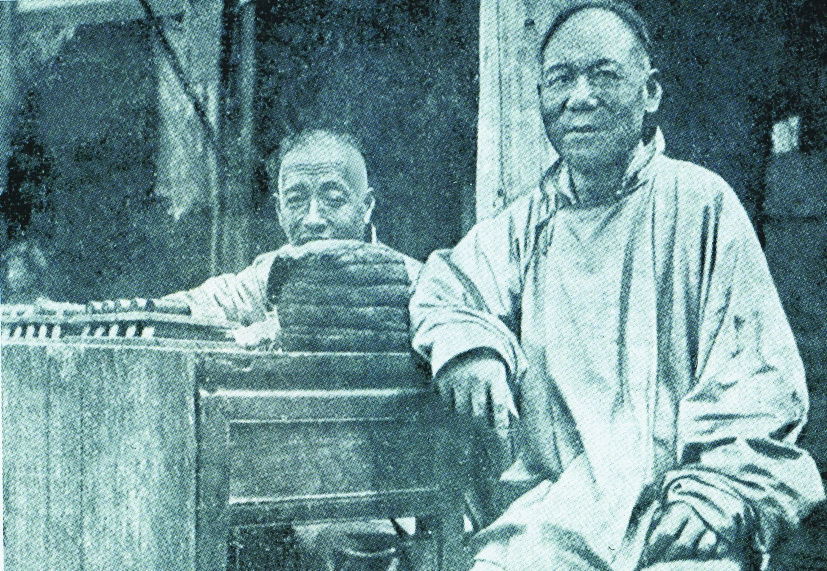 哈尔滨街头的钱桌子，从事民间性货币兑换